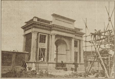 20世纪20年代末宁波中山公园门楼